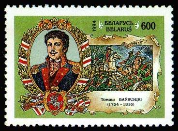 Беларуская (тарашкевіца): Томаш Ваўжэцкі. Белпошта